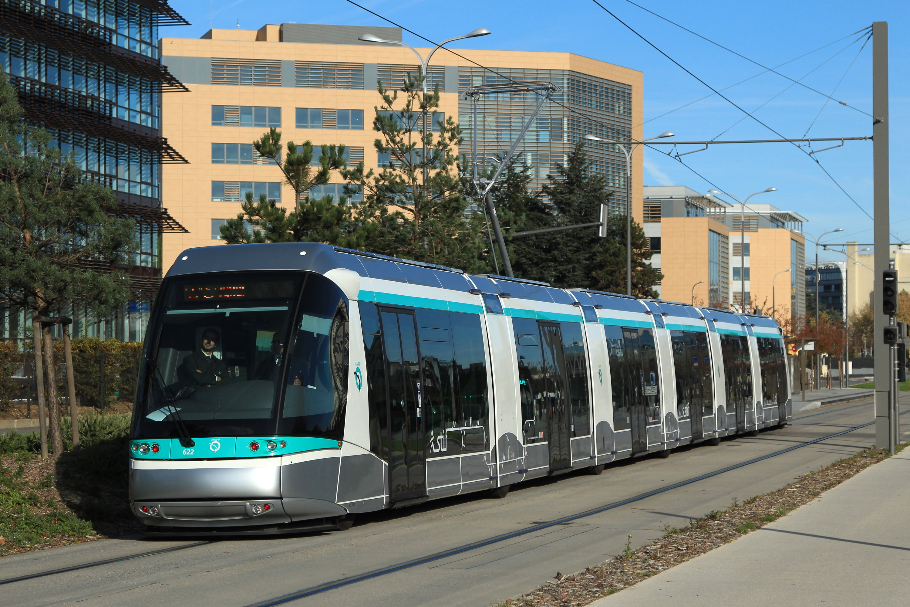 Une rame en essais de la ligne 6 du tramway entre « Dewoitine » et « Inovel Parc Nord ».